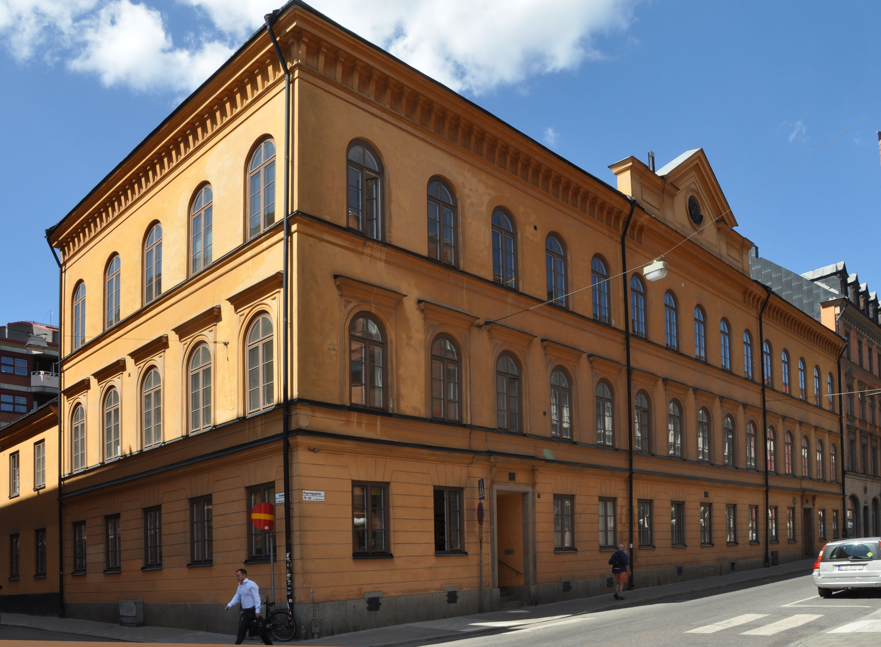 Regeringsgatan_79, f.d. Jacobs Realläroverk. Byggnadsår (huset mot Regeringsgatan) okänt, ombyggnad 1738-39 av C J Wustner, byggherre P Broman. 1849-50 genomgripande om- och tillbyggnad Johan Fredrik Åbom. 1881 påbyggnad med en våning